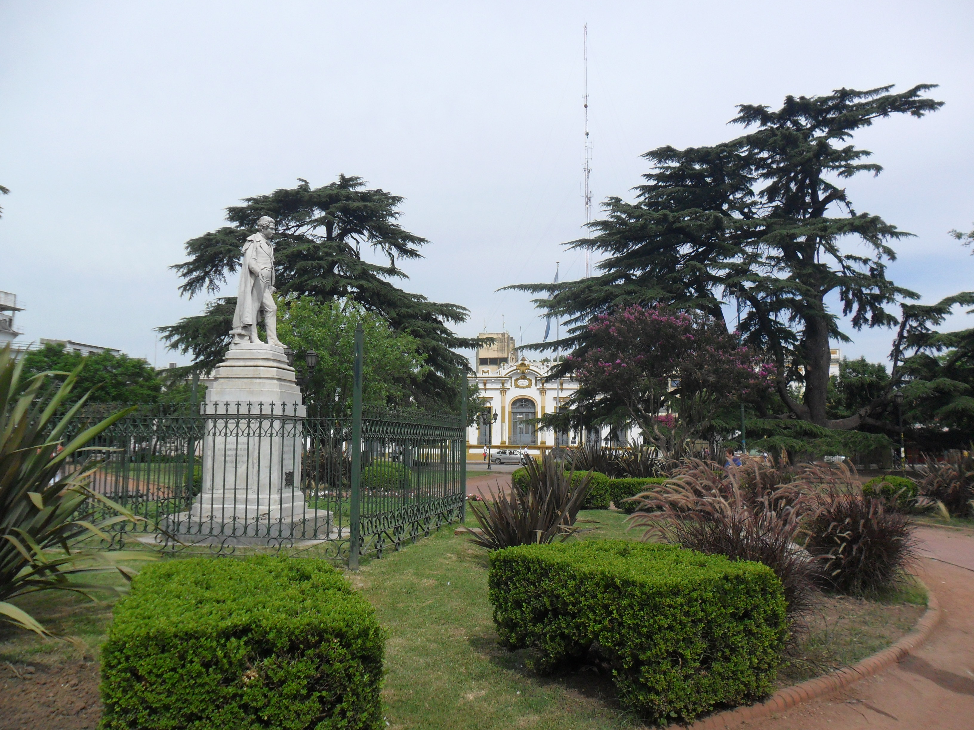 Plaza Mariano Moreno. Ciudad de Moreno, Provincia de Buenos Aires, Argentina.